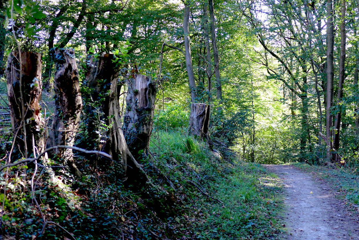 "Тропа Клинка" - туристский маркированнный маршрут вокруг немецкого города Золинген (Северный Рейн-Вестфалия). Шестой этап: вдоль реки Вуппер. 8.0 км.